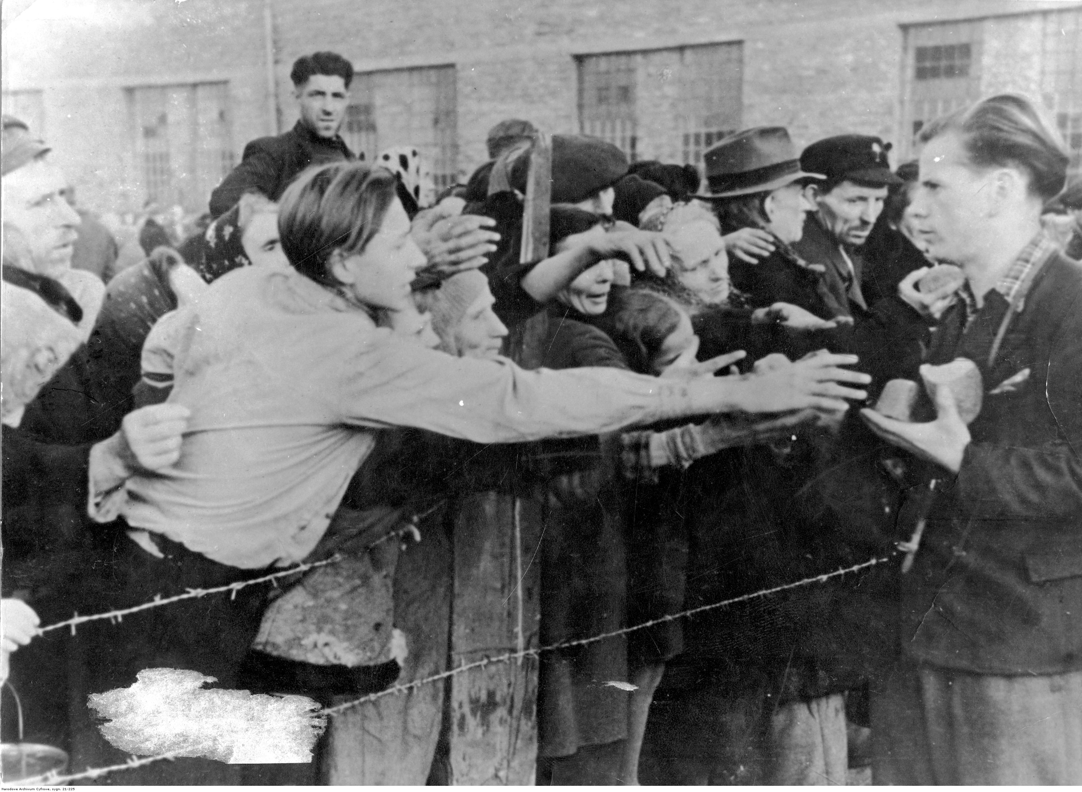 Rozdawanie chleba dla wypędzonych mieszkańców Warszawy.